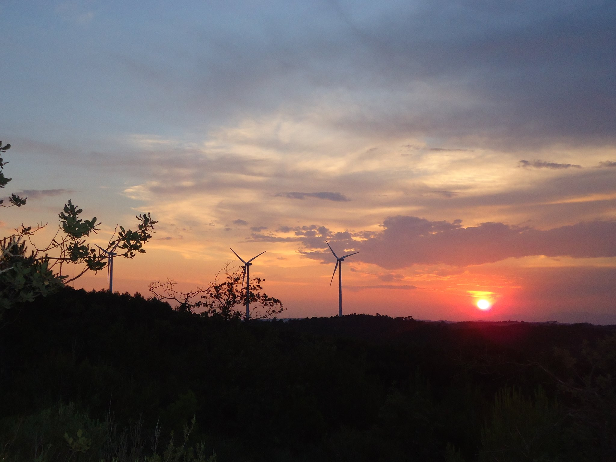 Posta de sol a la Serra de Rubió.